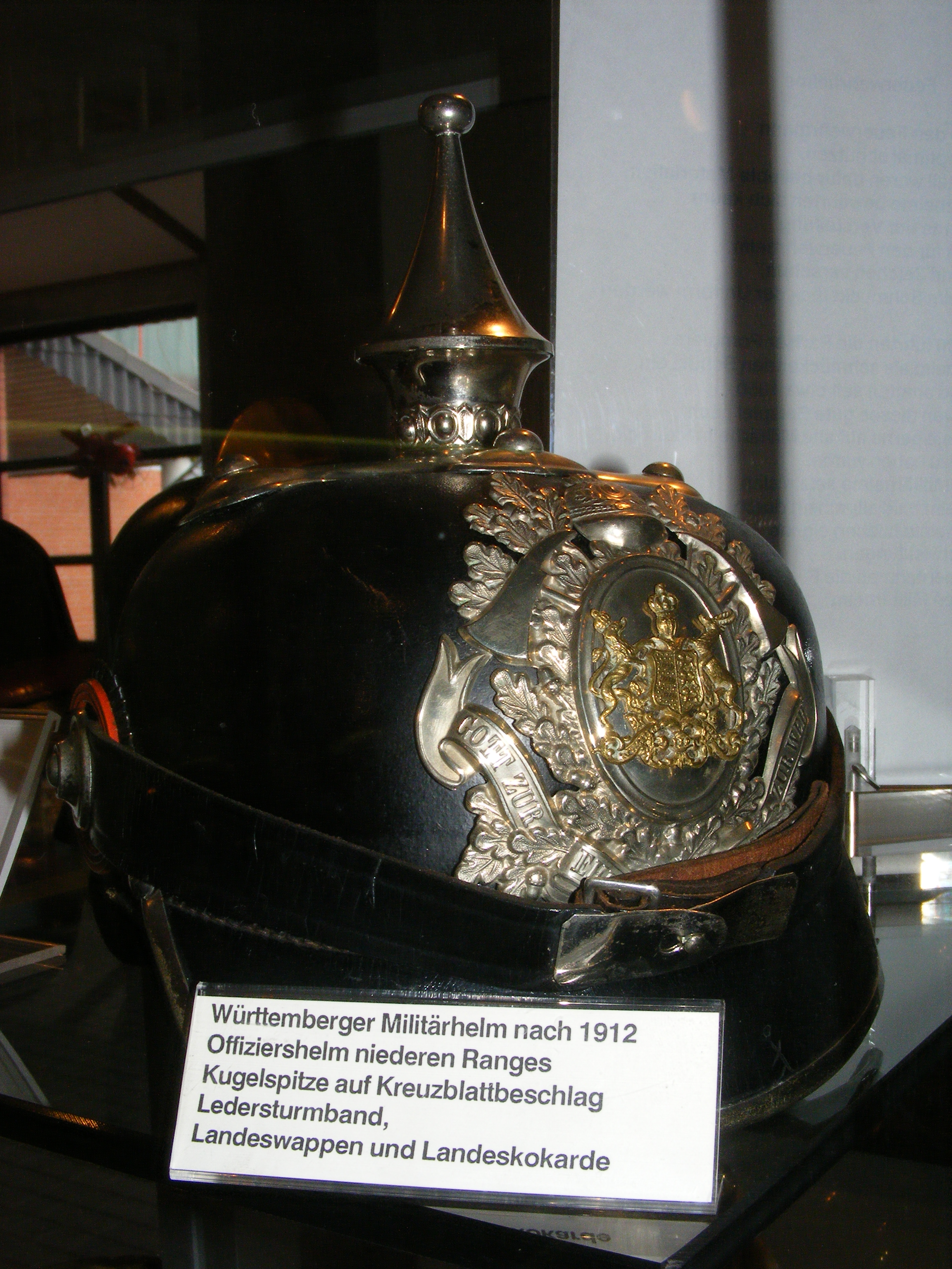 Württembergischer Militärhelm nach 1912, Kugelspitze auf Kreuzblattbeschlag, Ledersturmband, Landeswappen und Landeskokarde, Offizier niederen Ranges, schwarz, Deutsches Feuerwehrmuseum (Fulda).